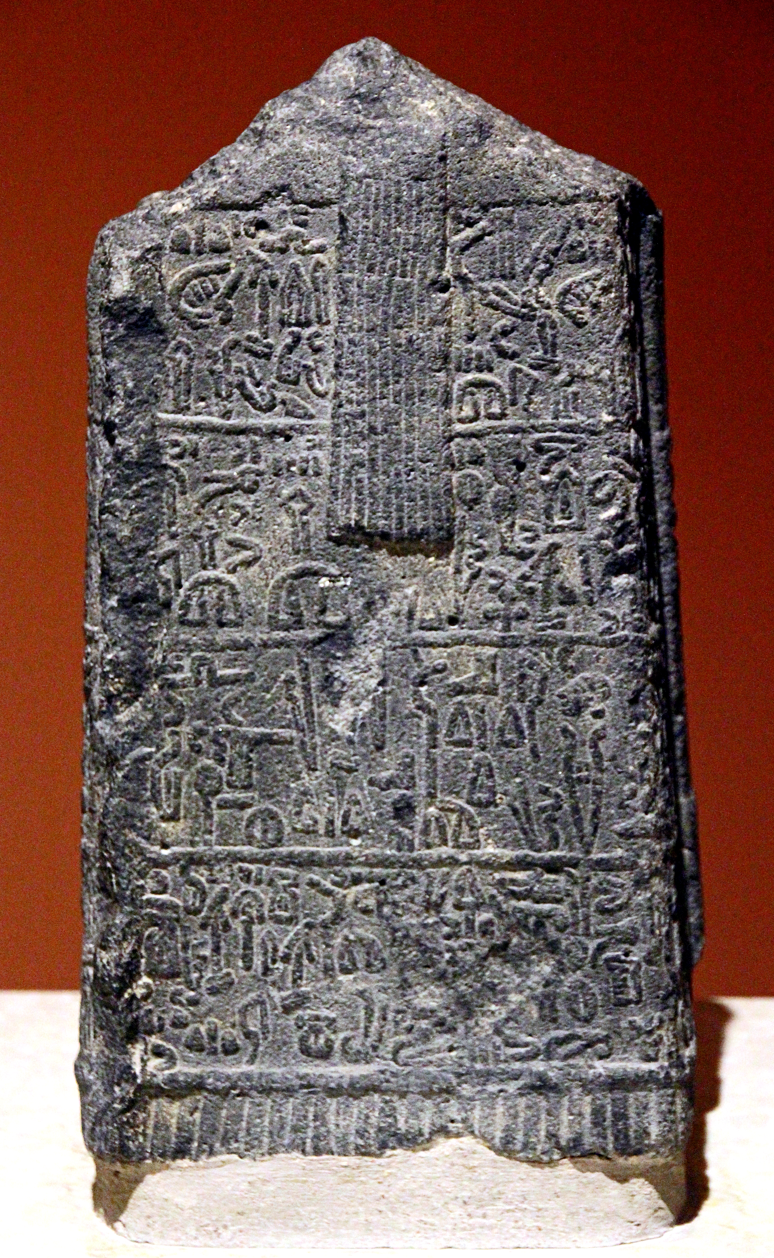 Archäologisches Museum Kahramanmaraş, Türkei, Statuenfragment Maraş 14, Vorderseite (B)